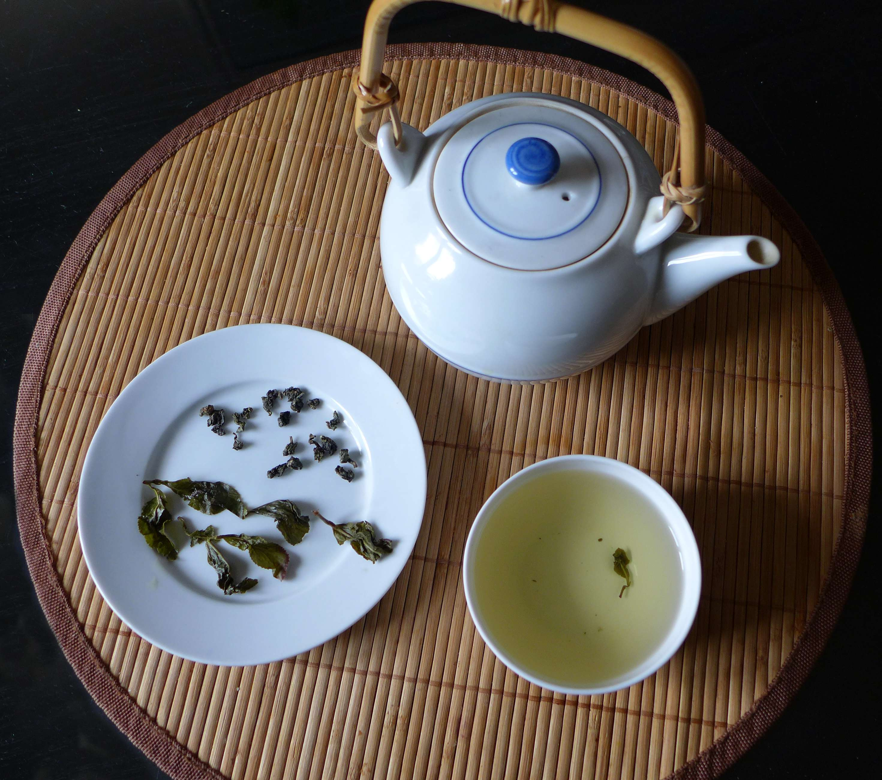 Thé dongding wulong 冻顶, feuilles avant et après infusion, liqueur